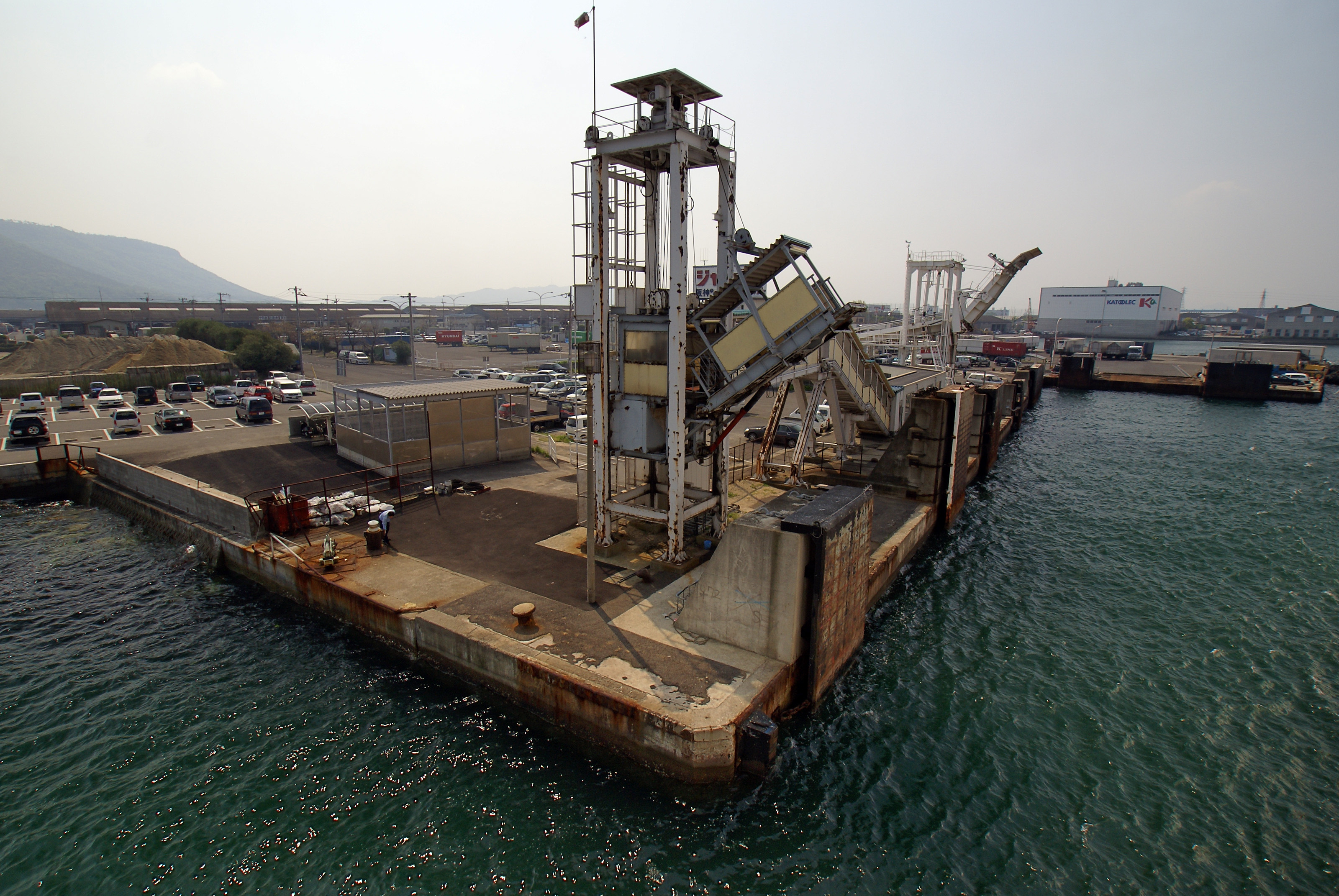 =Takamatsu-higashi port in Takamatsu, Kagawa prefecture, Japan